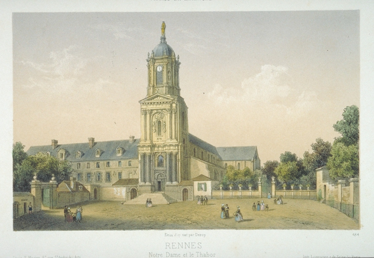 Vue animée et en couleurs de Notre-Dame et du Thabor, avec en premier plan la place animée par des personnages.